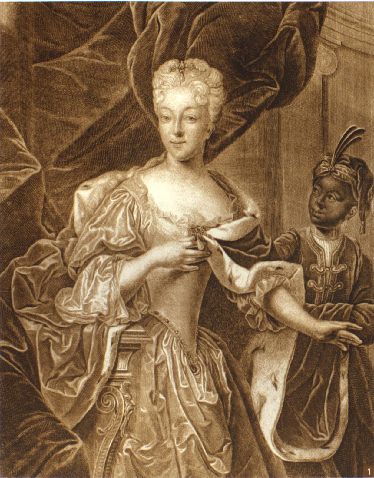 Шарлотта Христиана София, кронпринцесса Брауншвейт-Вольфенбюгтельская